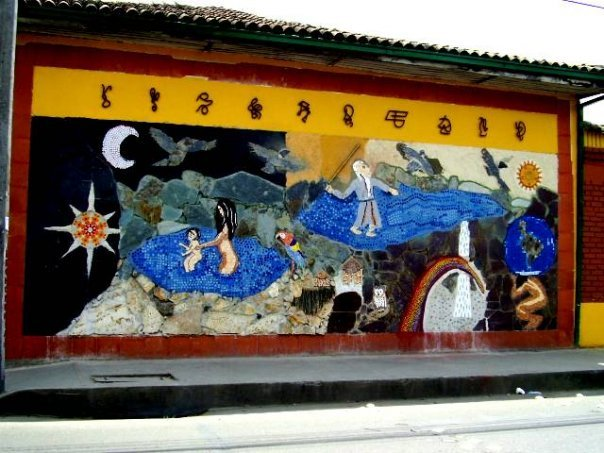 mural del origen muisca de la localidad de BOSA